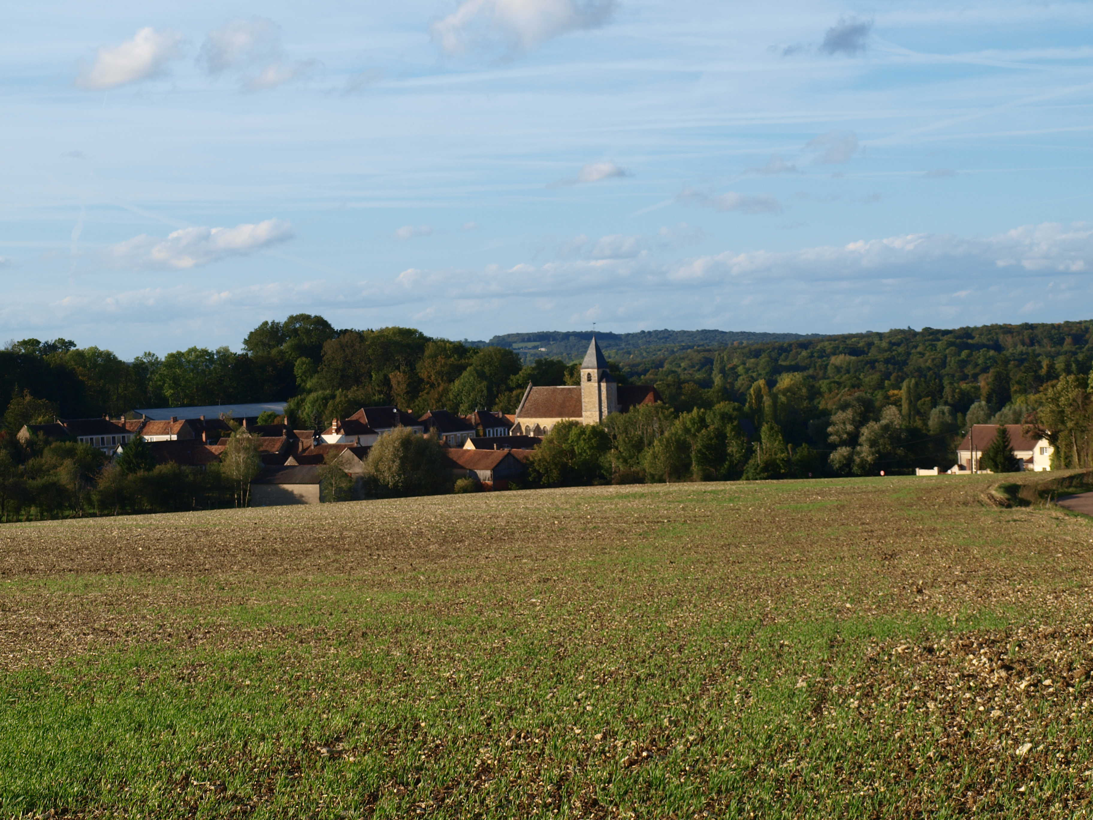 Sainte-Colombe-sur-Loing (Yonne, France)